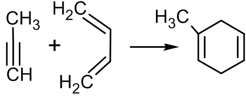 dils-alder